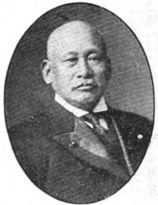 石井省一郎